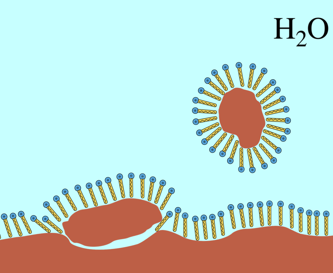 Tenside und Feststoff (Braun markierte ist Feststoff)